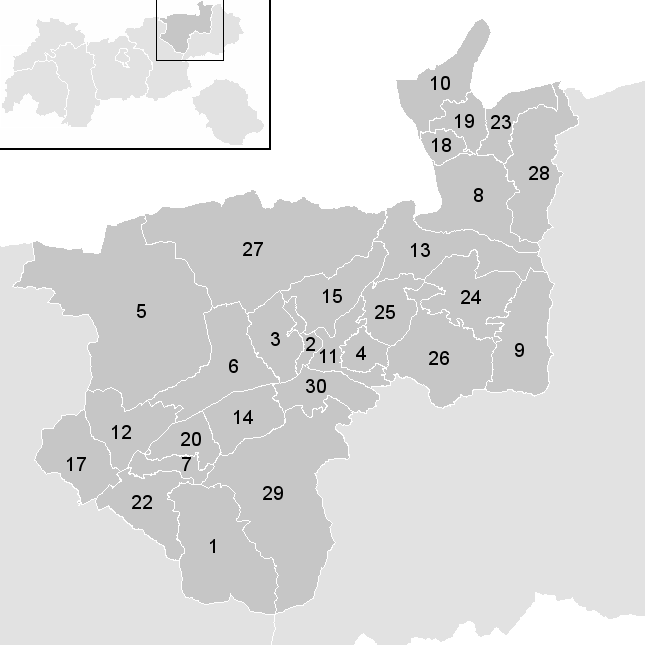 Leere Karte mit den Gemeinden im Österreichischen Bezirk Kufstein